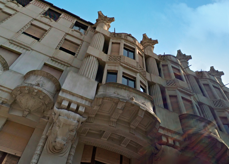 Liberty a Torino - Casa Avezzano